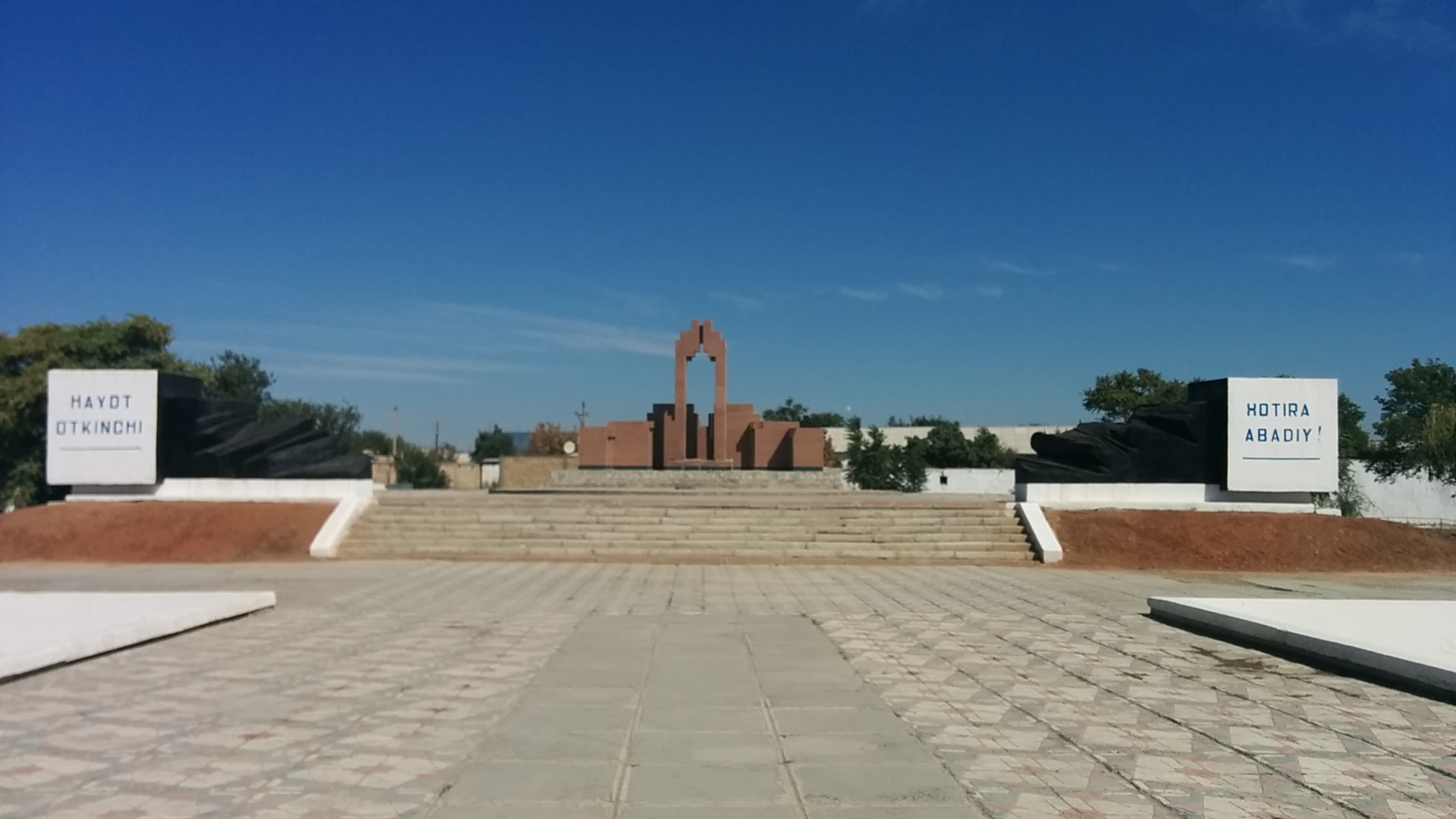 2015 yil